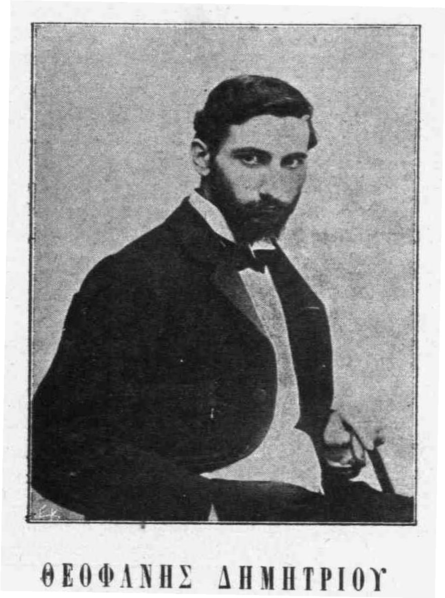 griechischer Bildhauer, 19. Jahrhundert